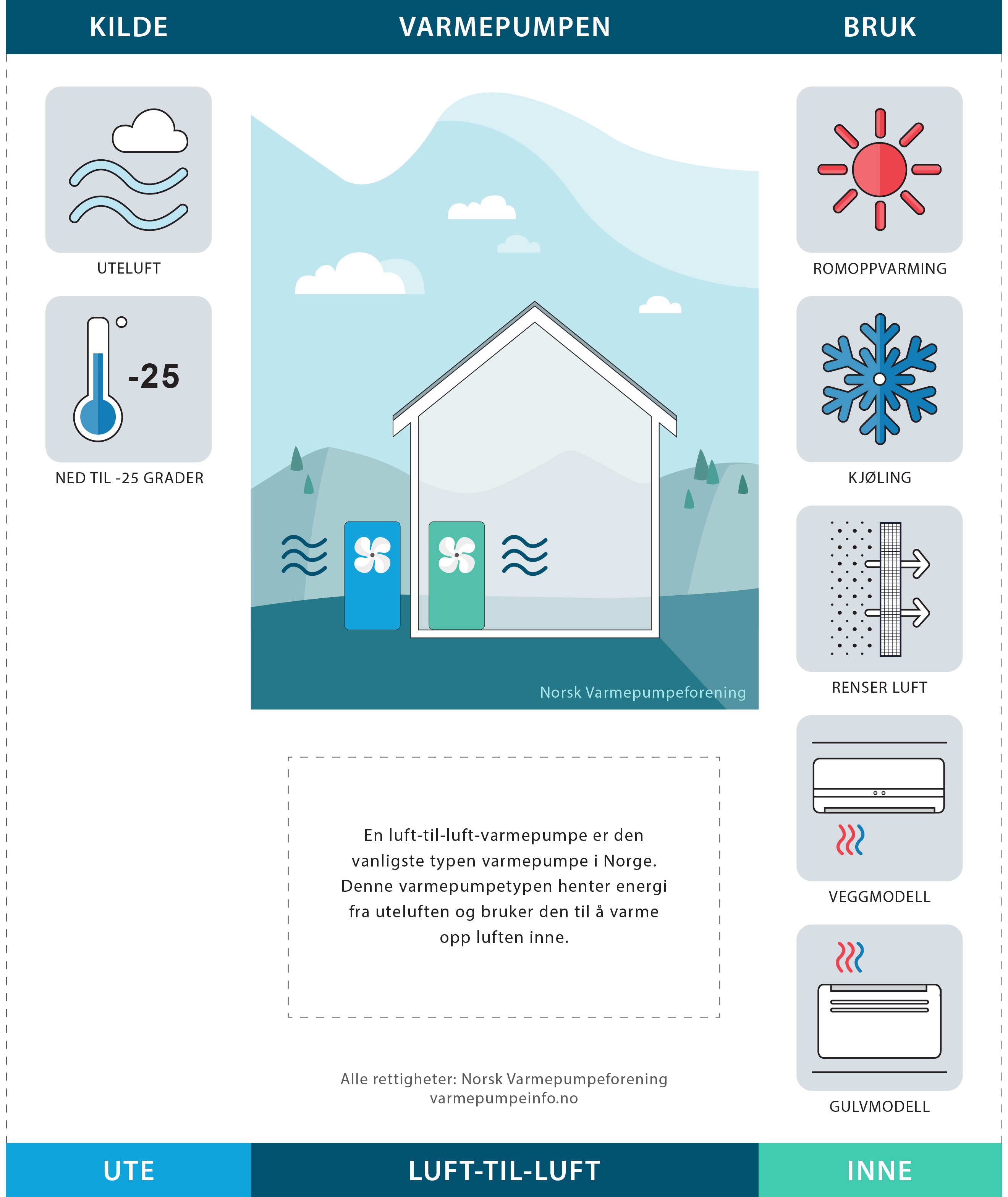 Diagram over hvordan luft-til-luft-varmepumper fungerer i en bolig.